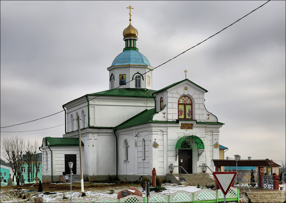 Карэлічы. Царква Святых Пятра і Паўла